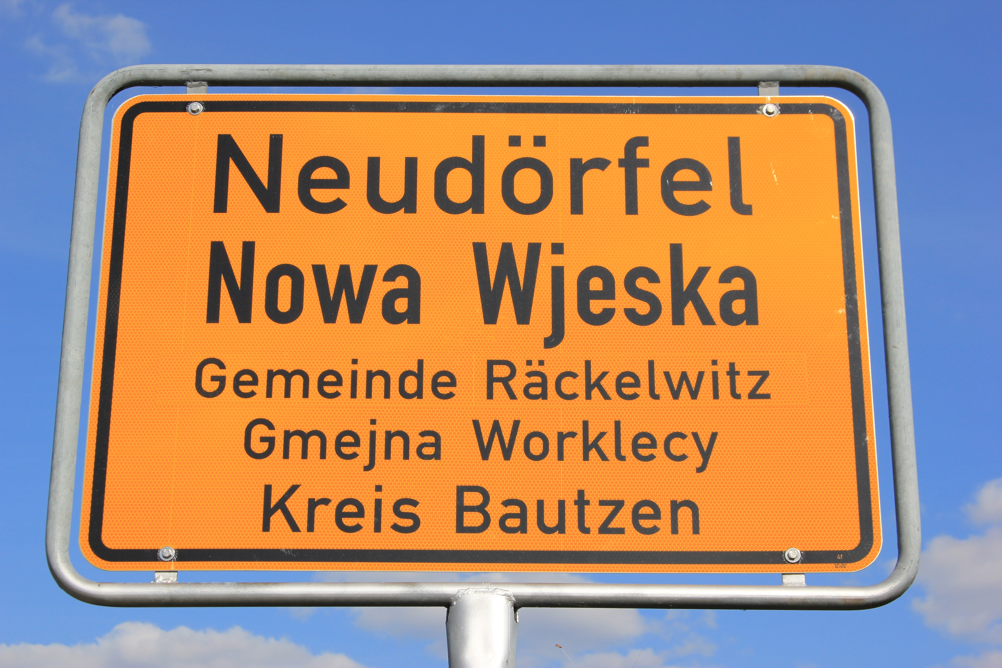 Hornjoserbsce: Dwurěčna wjesna tafla w Nowej Wjesce